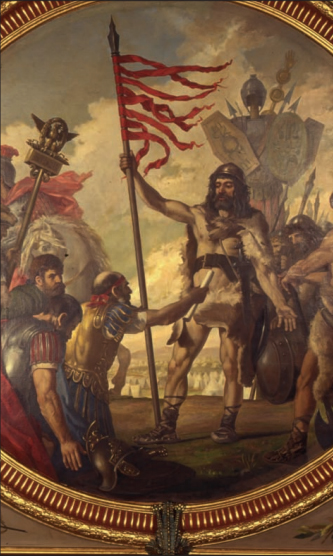 Pintura representando a Viriato, obra del pintor español Ramón Padró y Pedret.